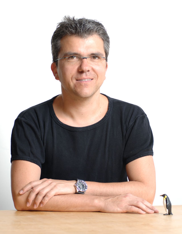 PeterSchaaff